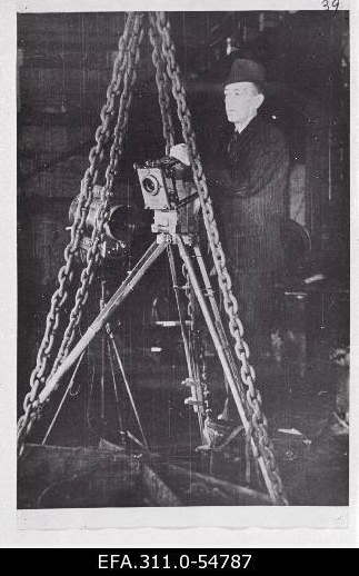 Оператор студии Ээсти Культуурифильм Константин Мярска на киносъёмке на заводе